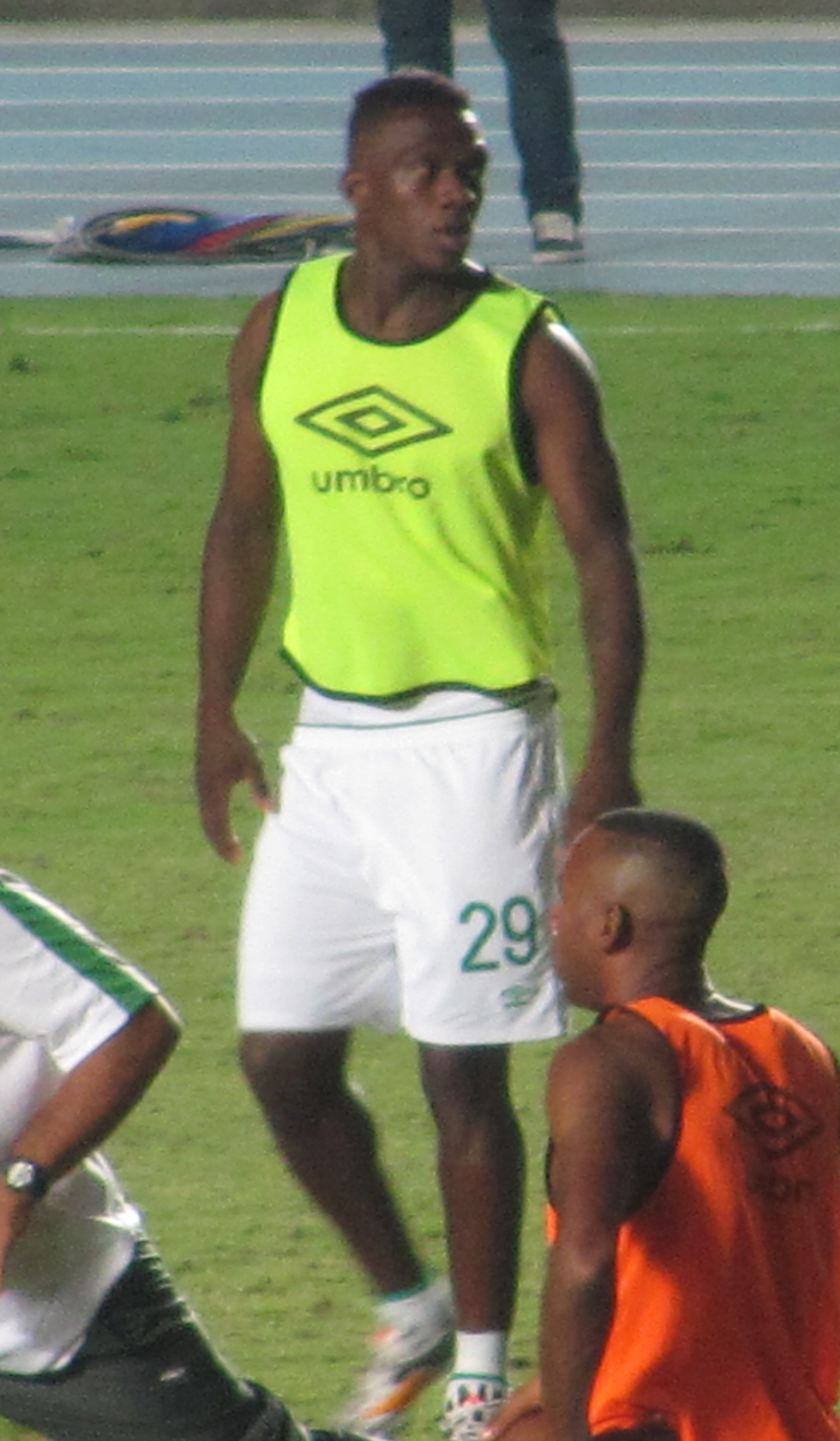 Partido entre el Glorioso Deportivo Cali y el américa, 2do ex-clásico de la Copa Colombia 2014 cuyo resultado fue un empate a 0.